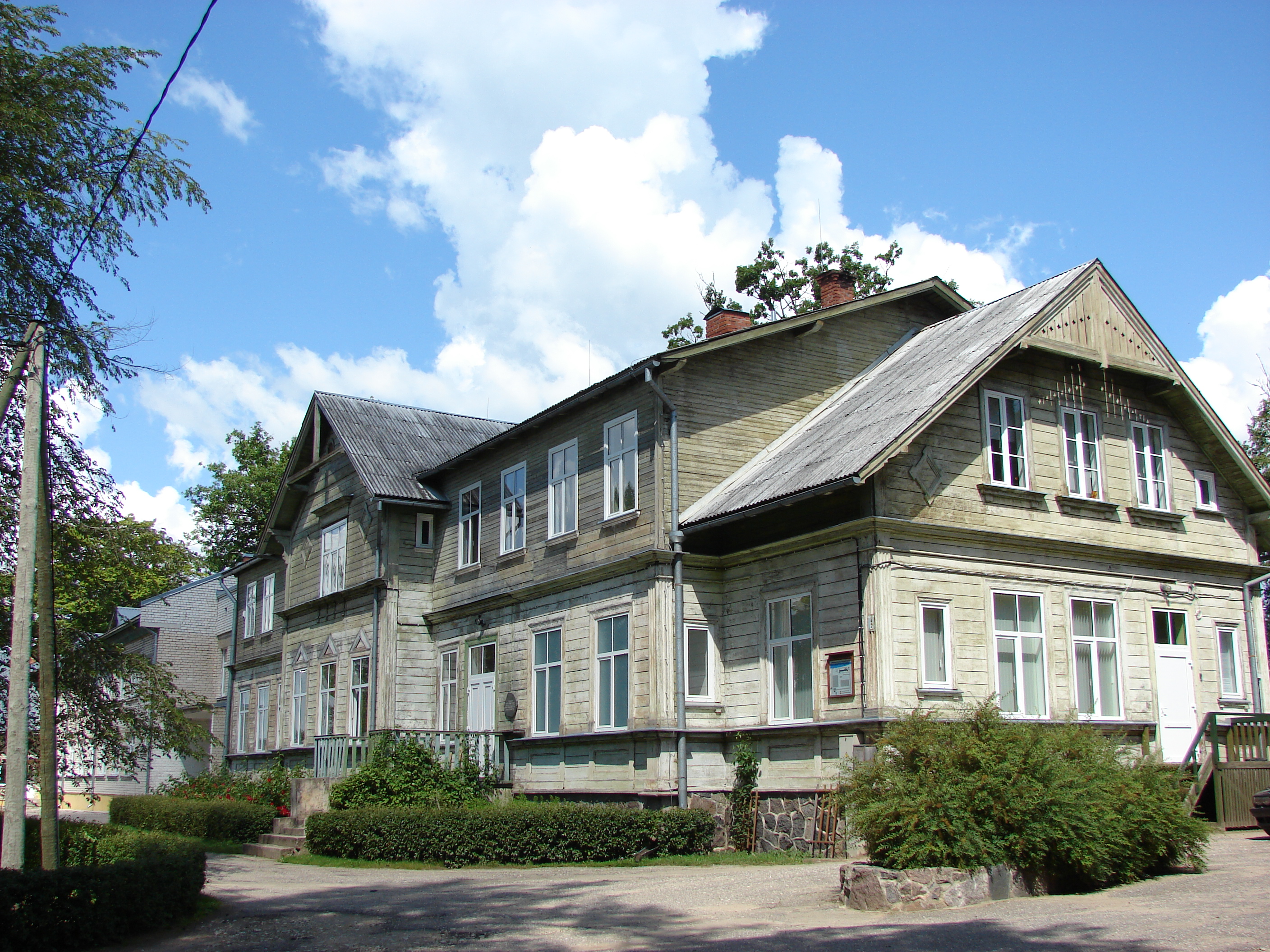 Veļķu muiža - šobrīd Vaidavas internātskola Skolas iela 5, Vaidava, Vaidavas pagasts, Kocēnu novads, Latvia